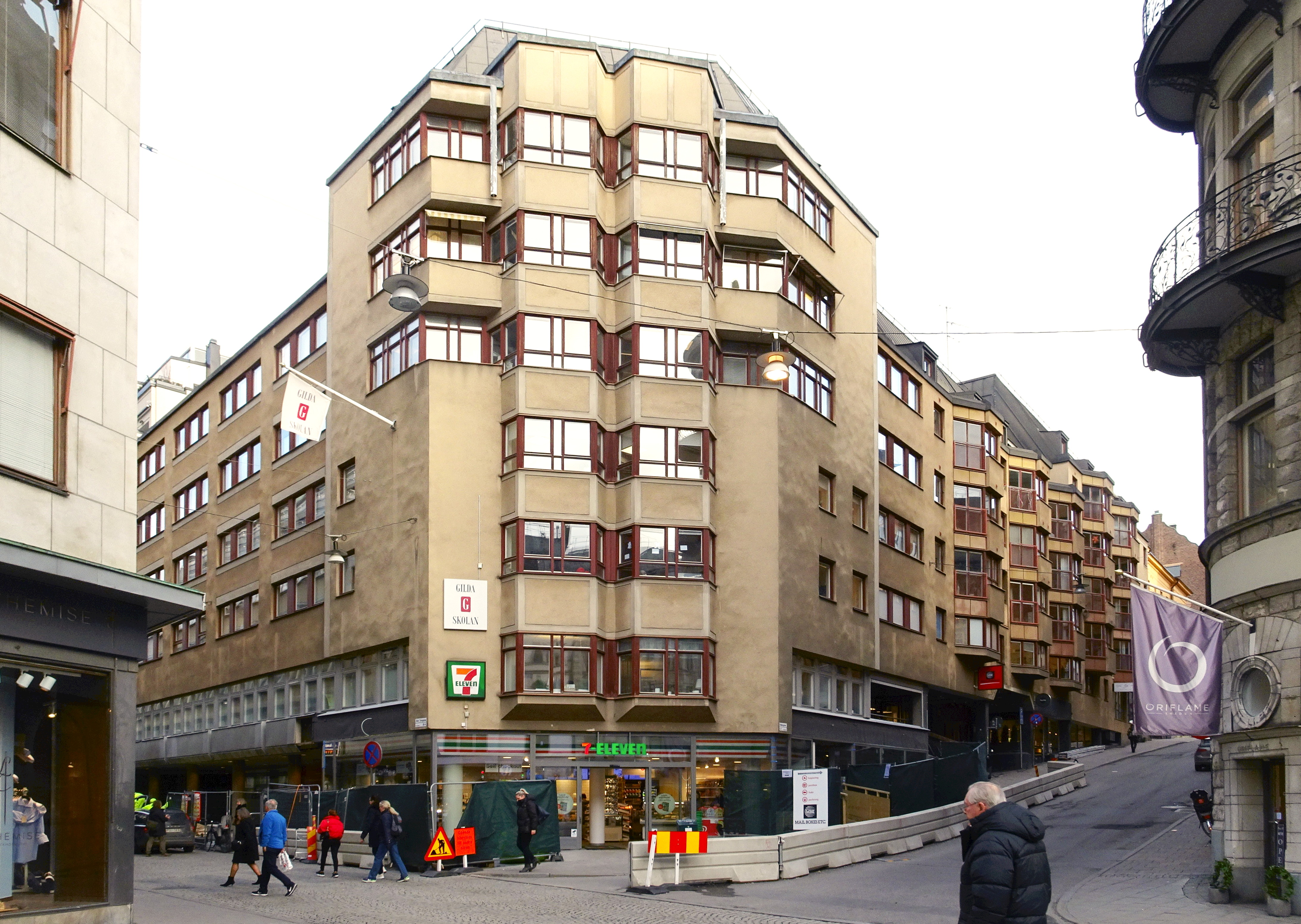 Riddargatan, Grev Turegatan (Riddaren 23 och 25 ) byggnaden uppfördes efter ritningar av EGÅ arkitektkontoret AB. Ansvarig arkitekt var Torgny Gynnerstedt. Byggår 1980.